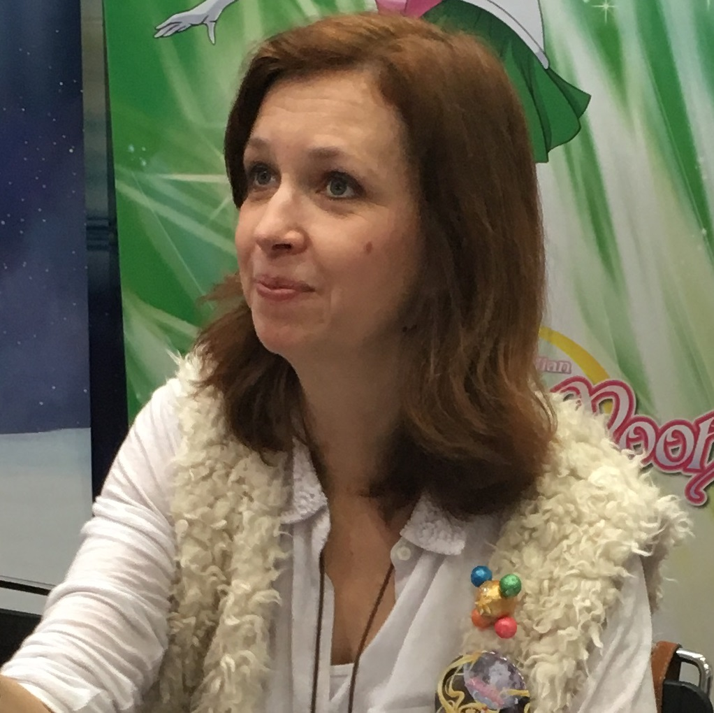 Sabine Bohlmann bei einer Autogrammstunde auf der Leipziger Buchmesse 2016.